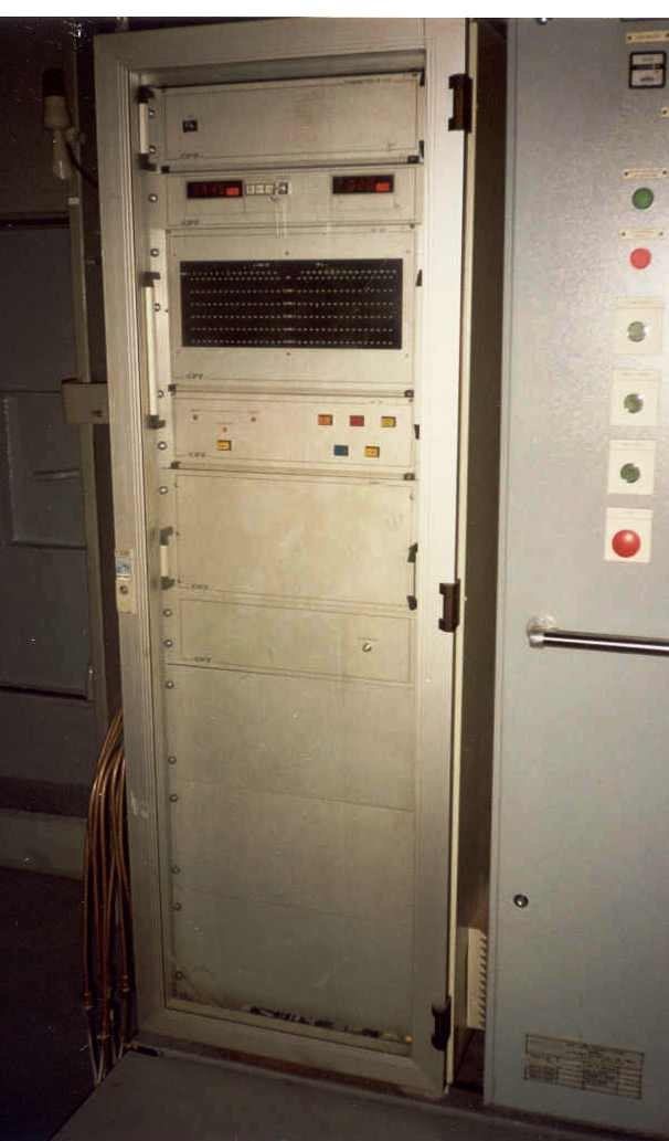 Zentral angeordneter Messchrank zur CO2-Messung in den einzelen Temperaturzonen